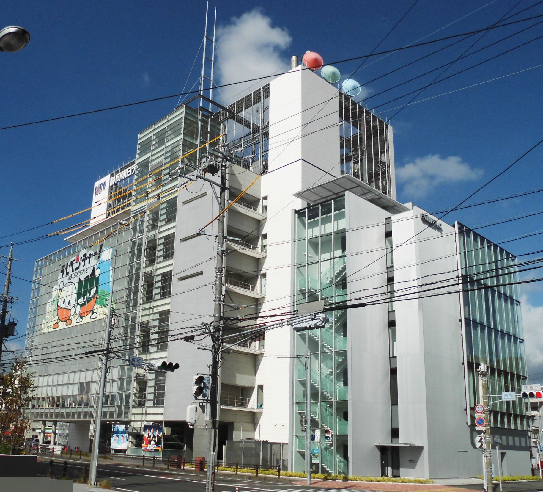 静岡朝日テレビ本社社屋（静岡市葵区東町・2018年増築後）